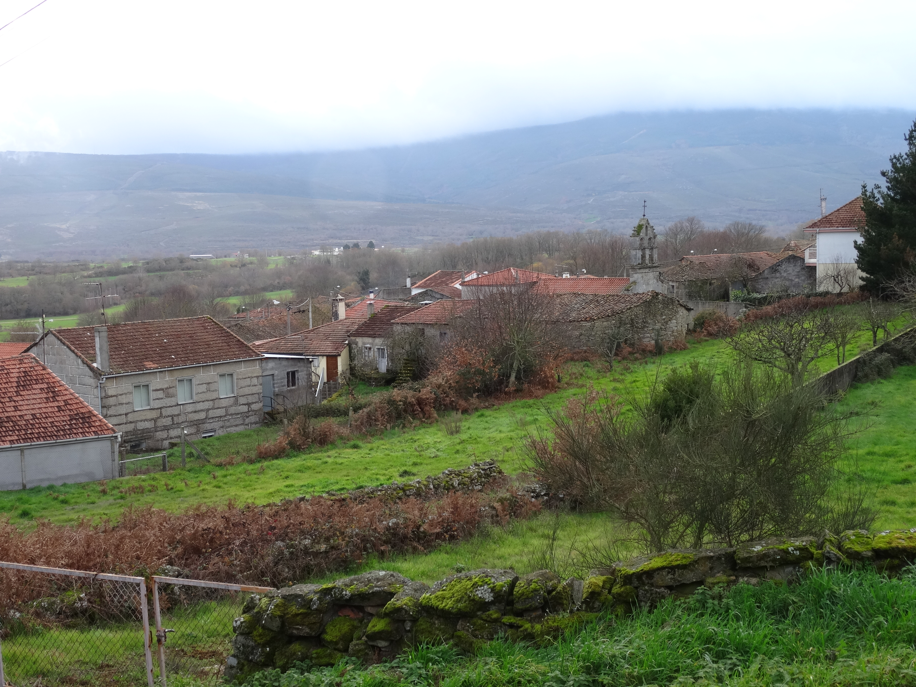 Vista de Texós, concello de Baltar, Ourense.